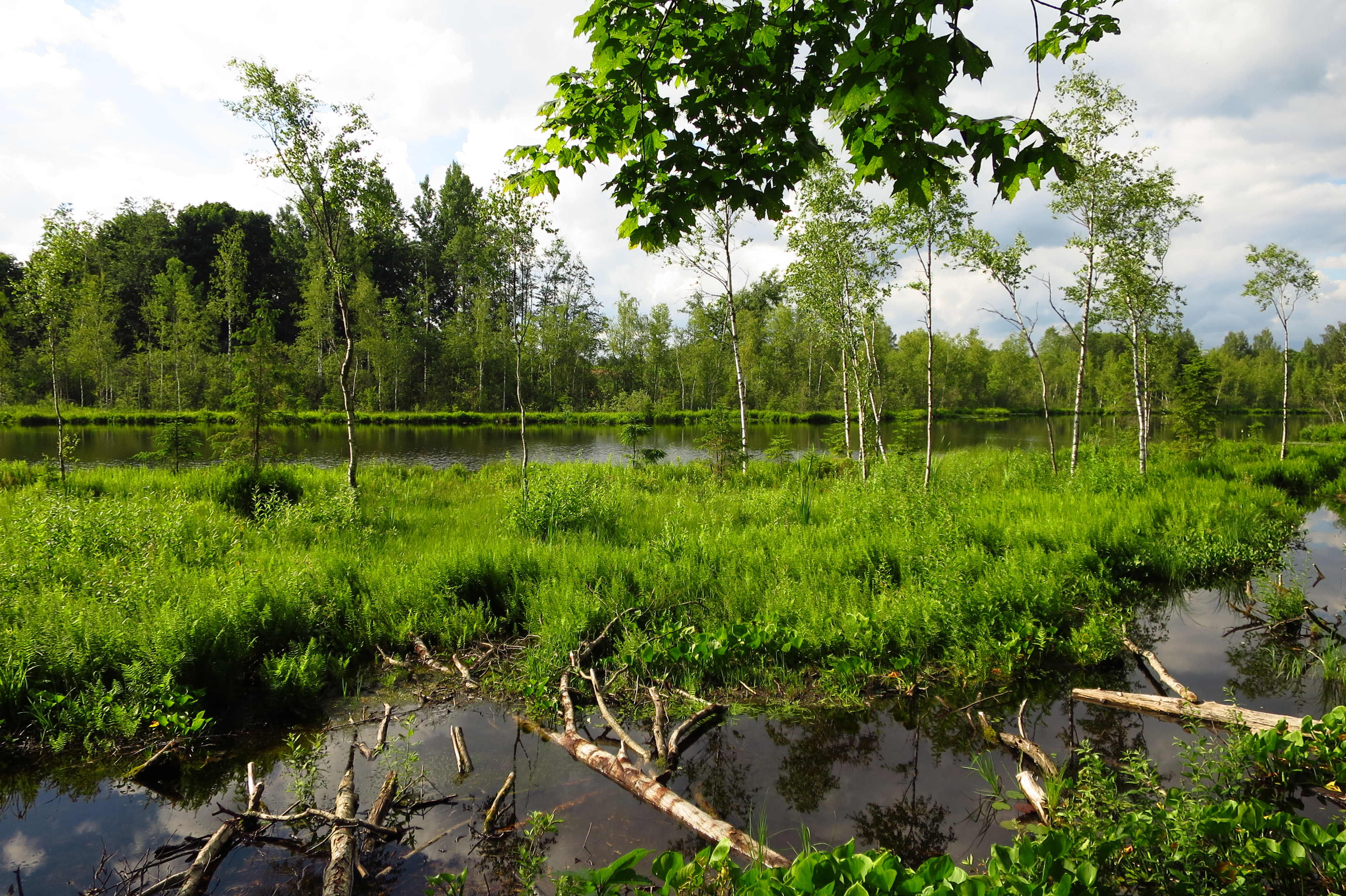 Holstre Mustjärv